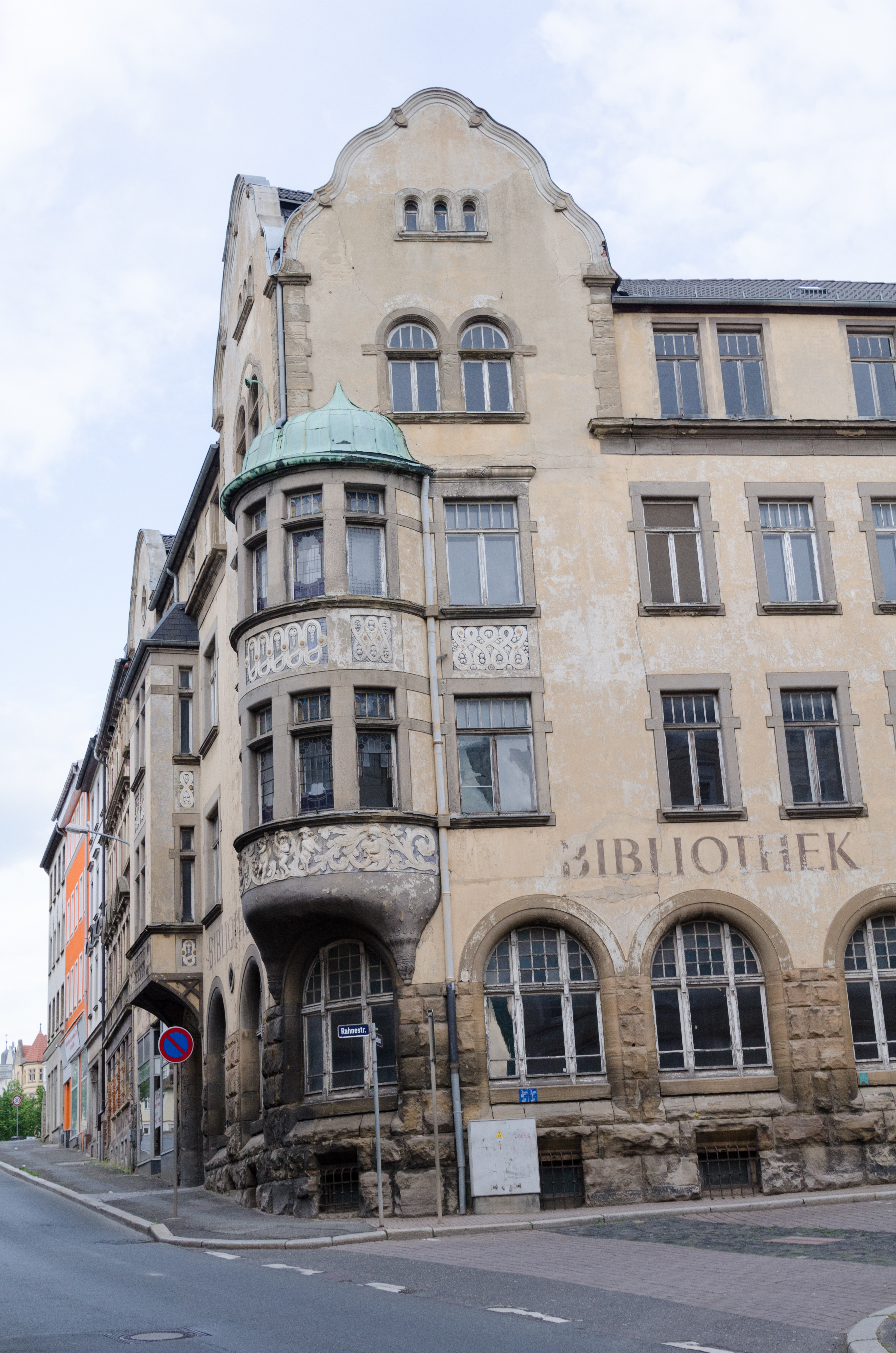 Zeitz, Rahnestraße 20